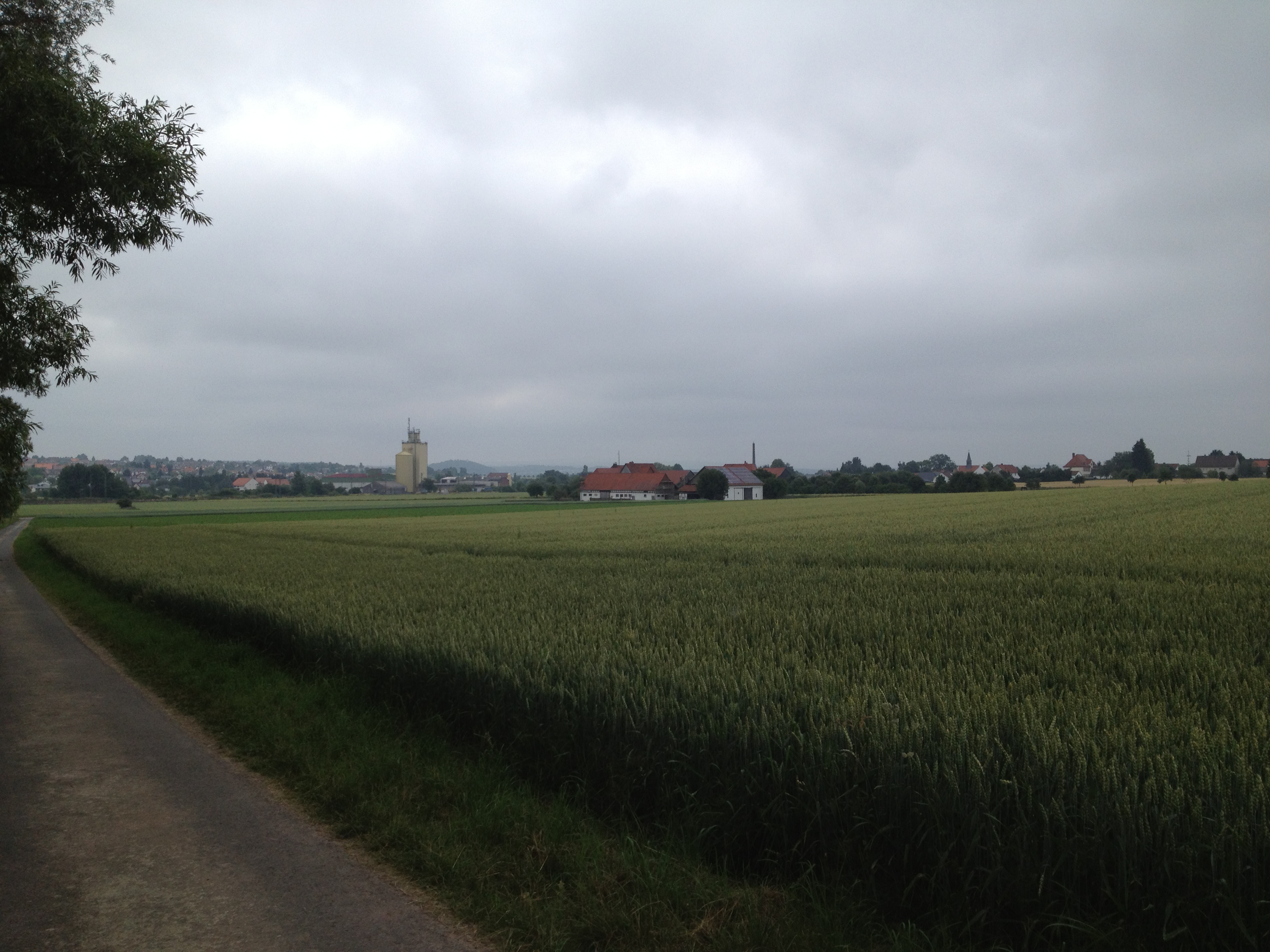 Kassel-Steig nahe Mönchehof